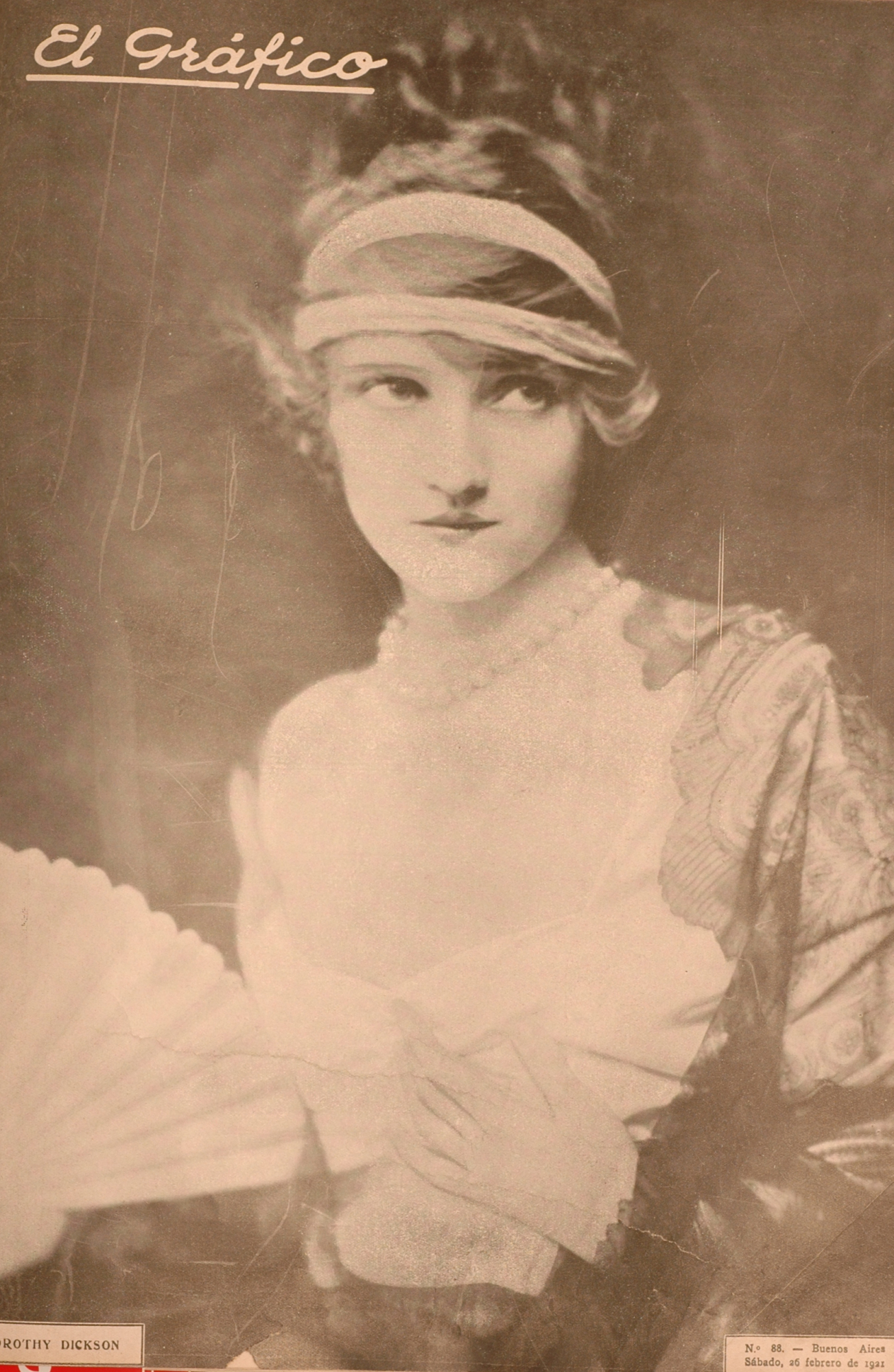 El Grafico del 26 de Febrero de 1921. Edicion 88